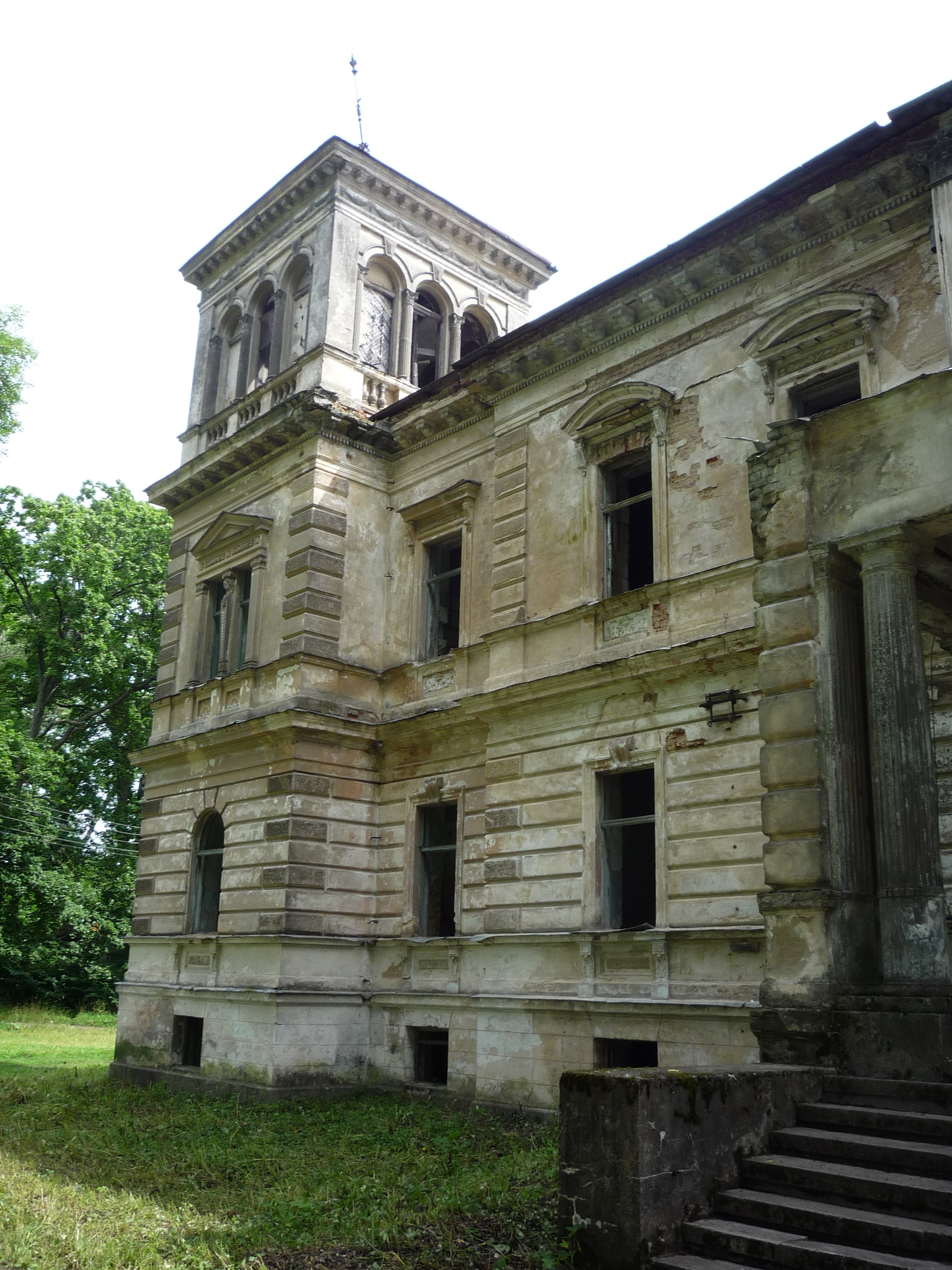 Беларуская (тарашкевіца): Сядзібна-паркавы комплекс: сядзібны дом, флігель, лядоўня, службовы будынак, будынак музычнай школы, вяндлярня, парк, паркавы павільён, водная сыстэма (сажалкі, каналы, мосьцікі). мяст. Лынтупы This is a photo of Belarusian heritage monument. Reference number: 213Г000874 ( WLM)